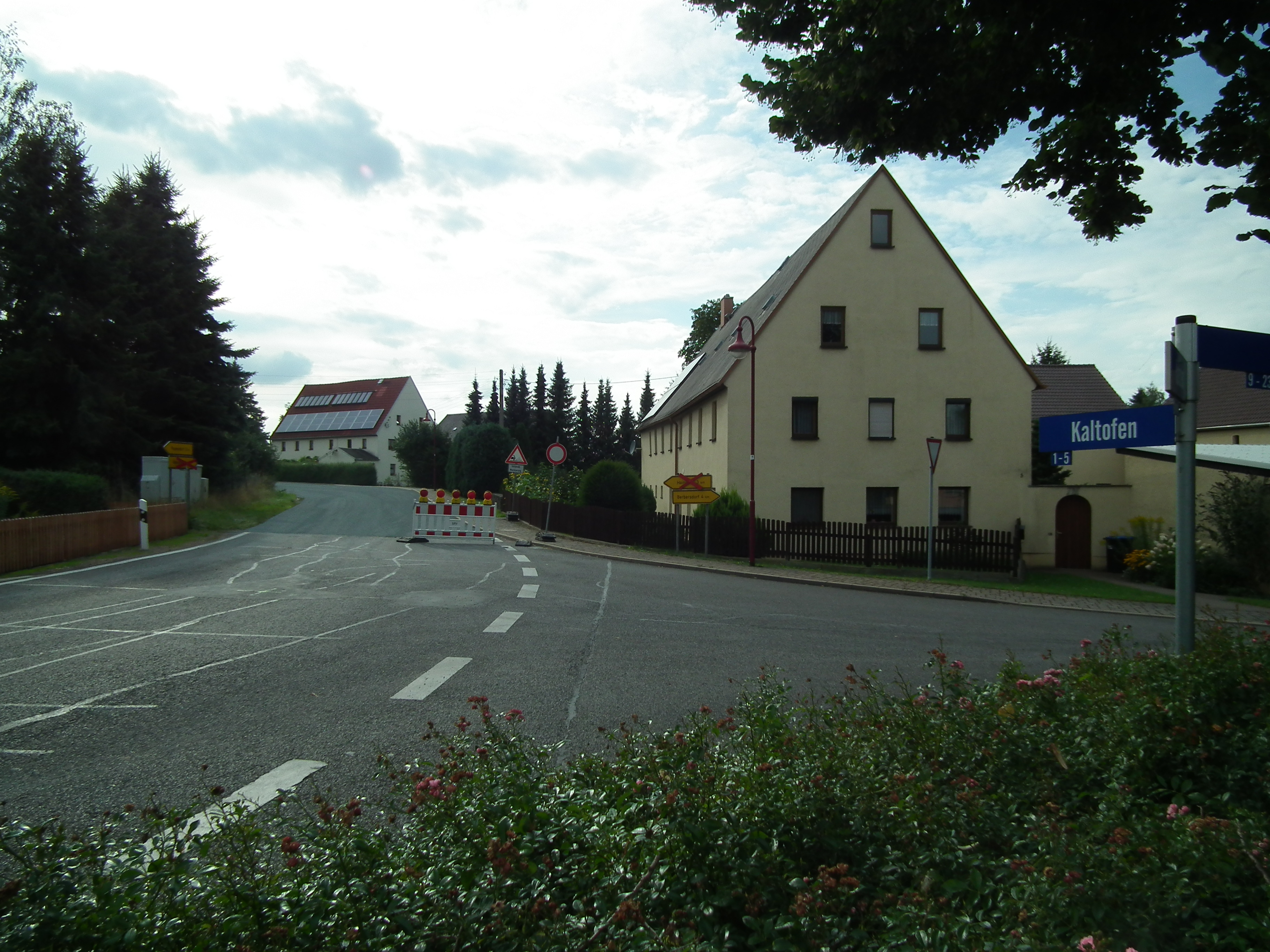 Kaltofen (Striegistal) Ortsansicht